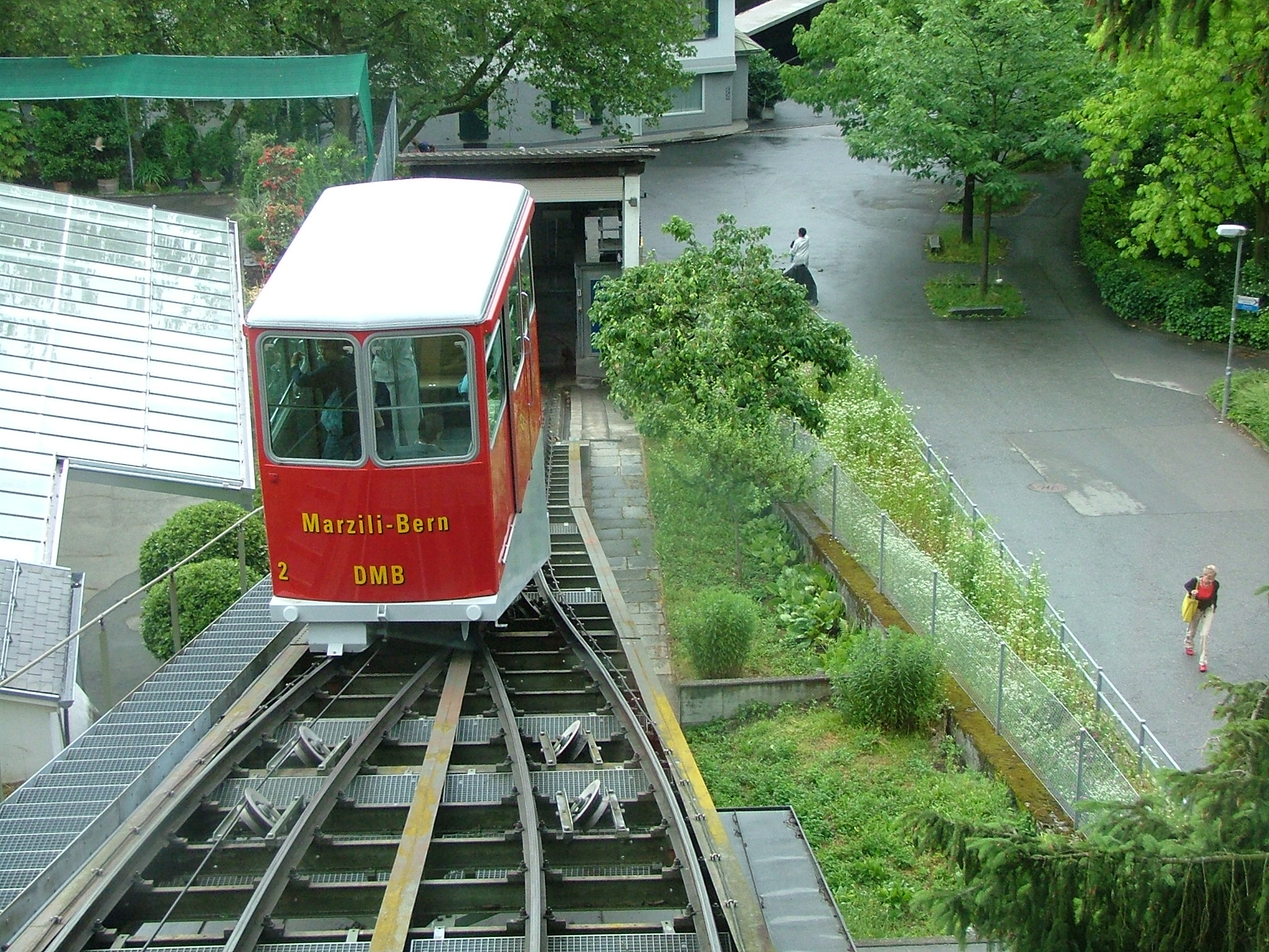 Kolej Marzilibahn w Bernie w 2006r.